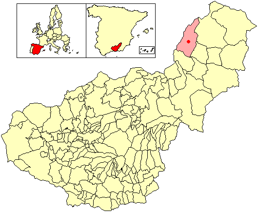 Situación de la localidad de Martín (en el municipio de Castril) respecto a la provincia de Granada, en España.